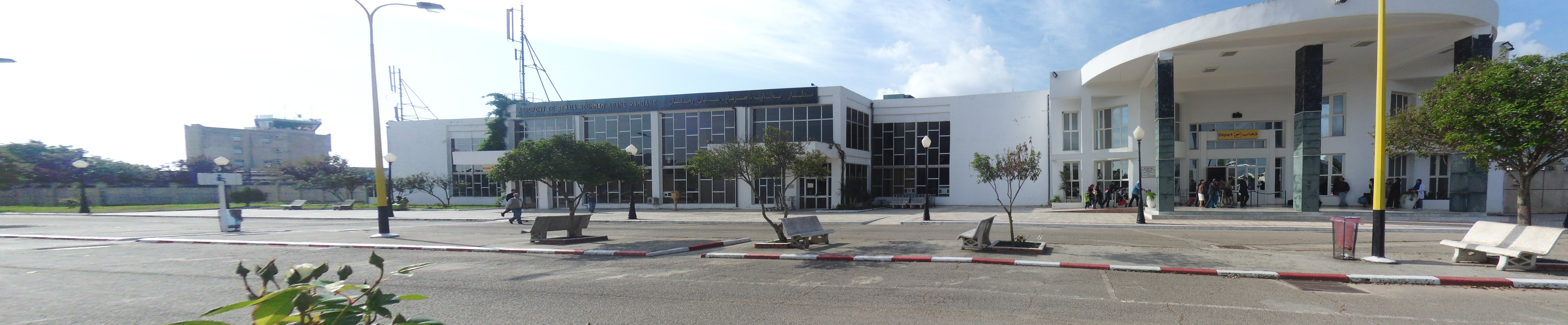 Aérogare de Béjaïa (assemblage de deux photo avec Hugin)